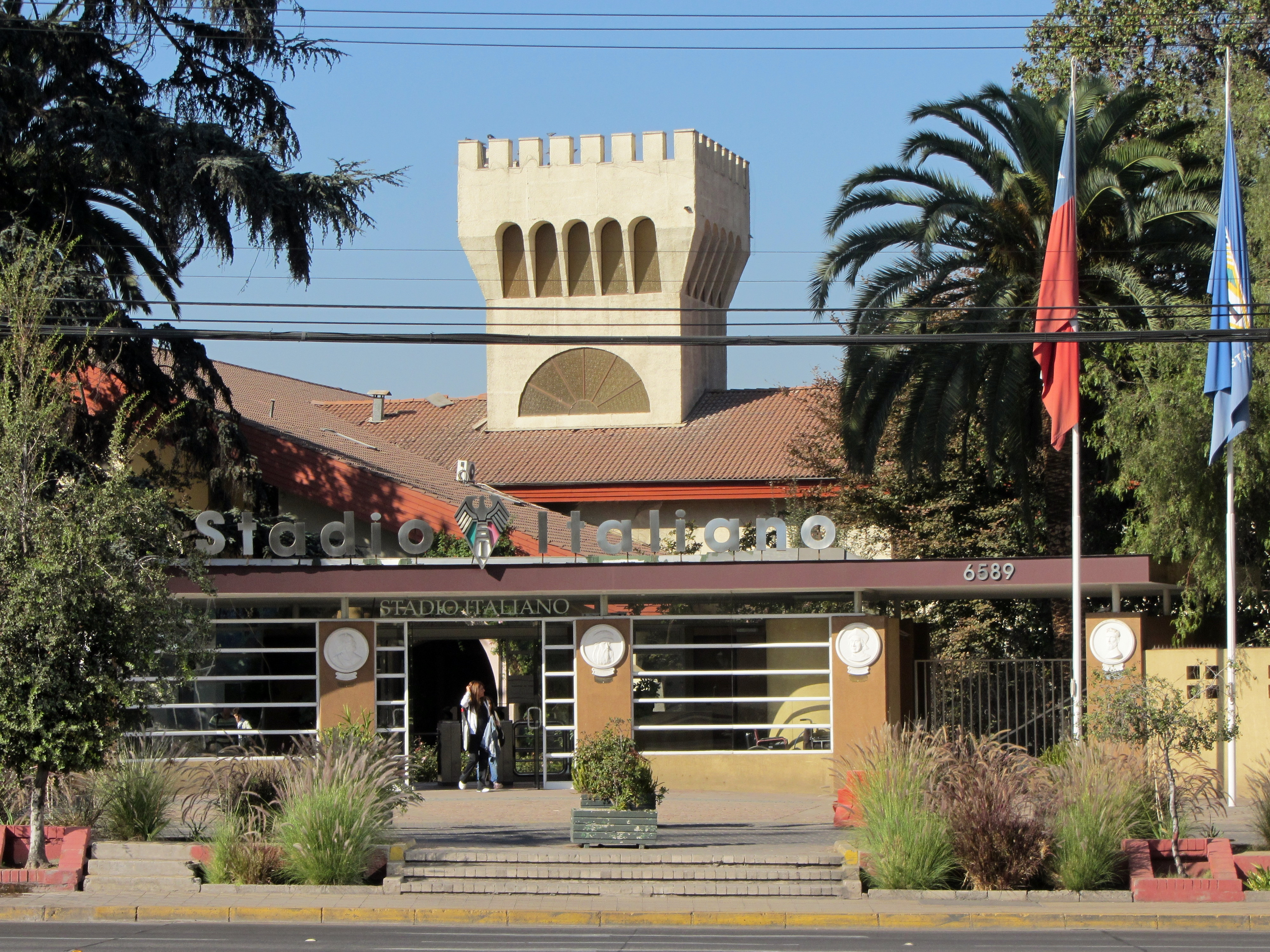 Estadio Italiano, Las Condes, Santiago de Chile